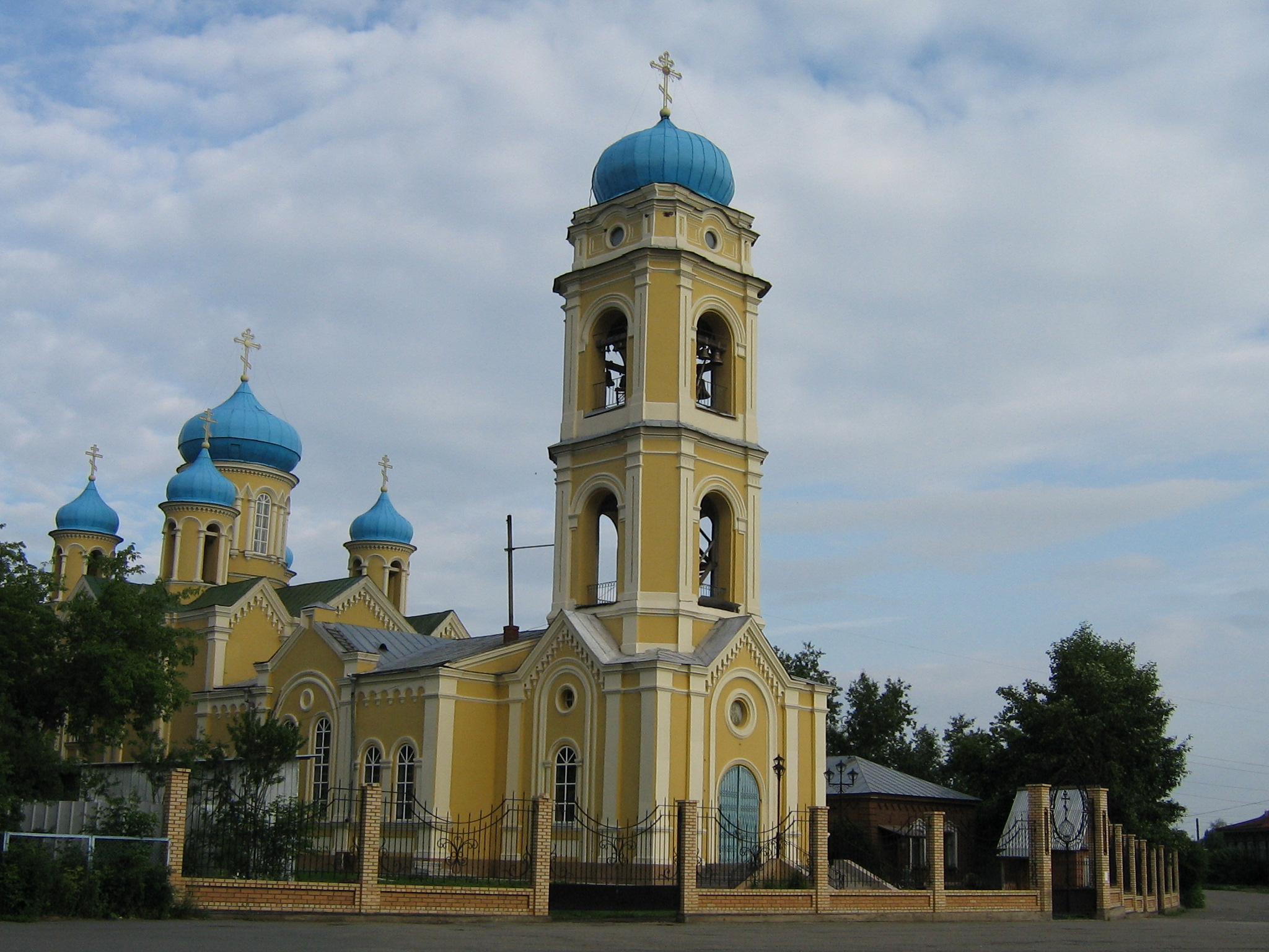 St. Nicholas Cathedral in Verhneuralsk